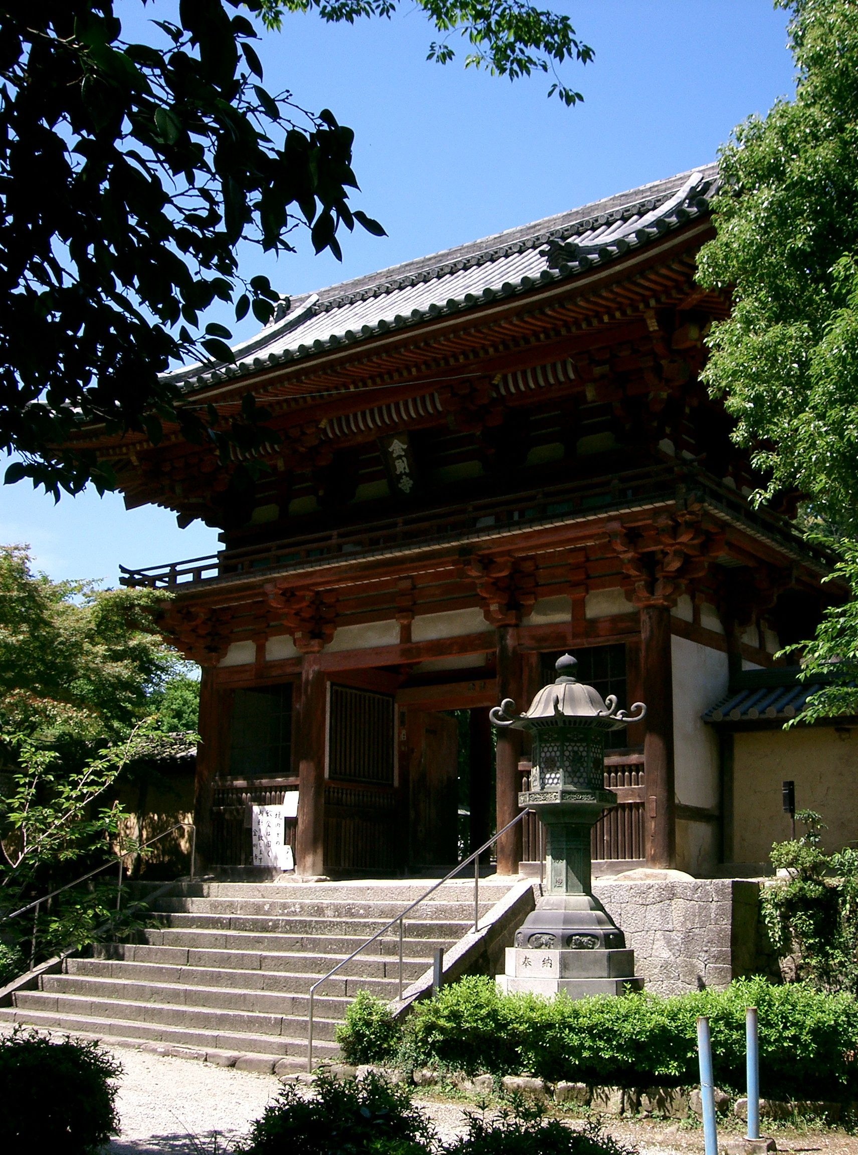 金剛寺 楼門